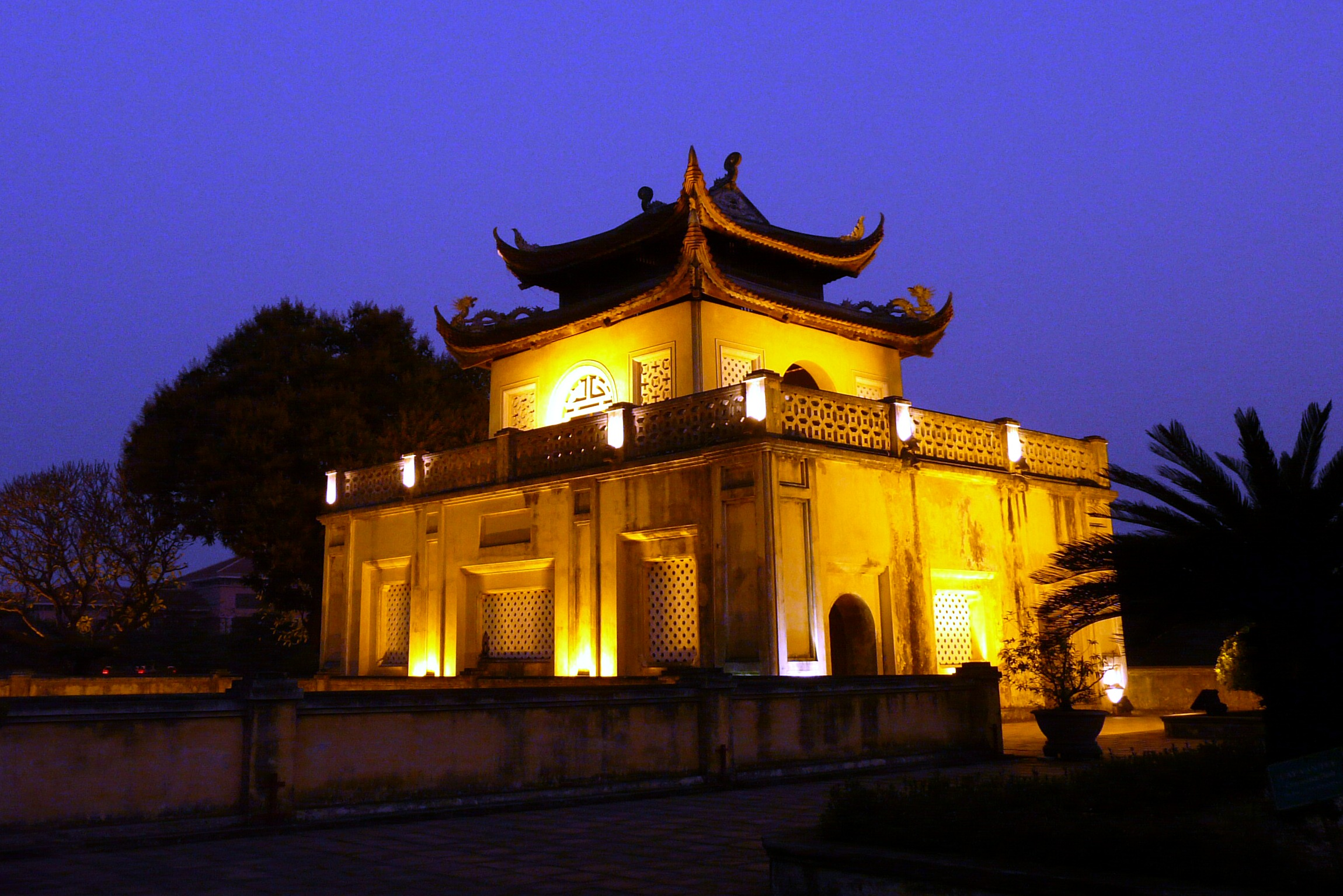 la citadelle de Hanoï à la tombé de la nuit